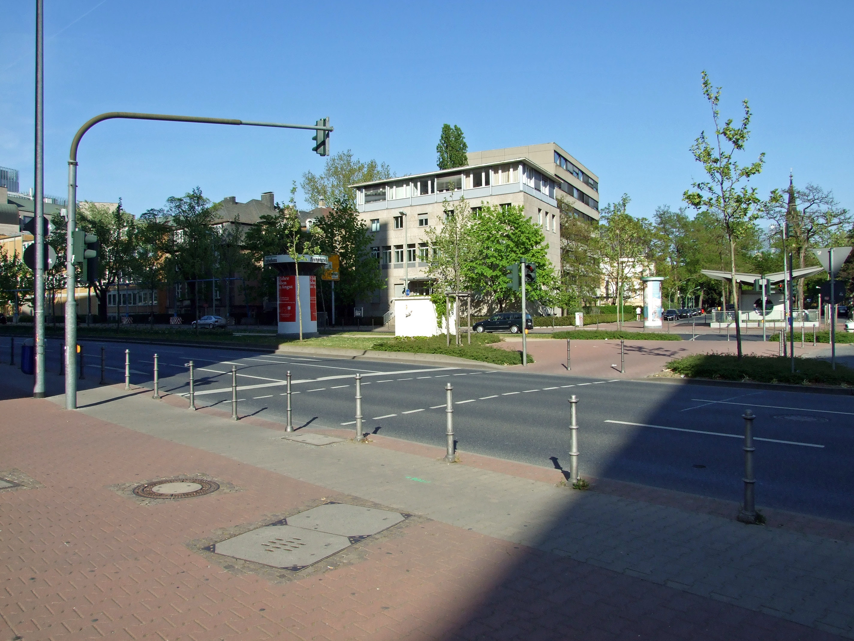 Verkehrsampel am „Frankfurter Institut für Sozialforschung“, die sog. „Adorno-Ampel“. Im Hintergrund ist das Institut.